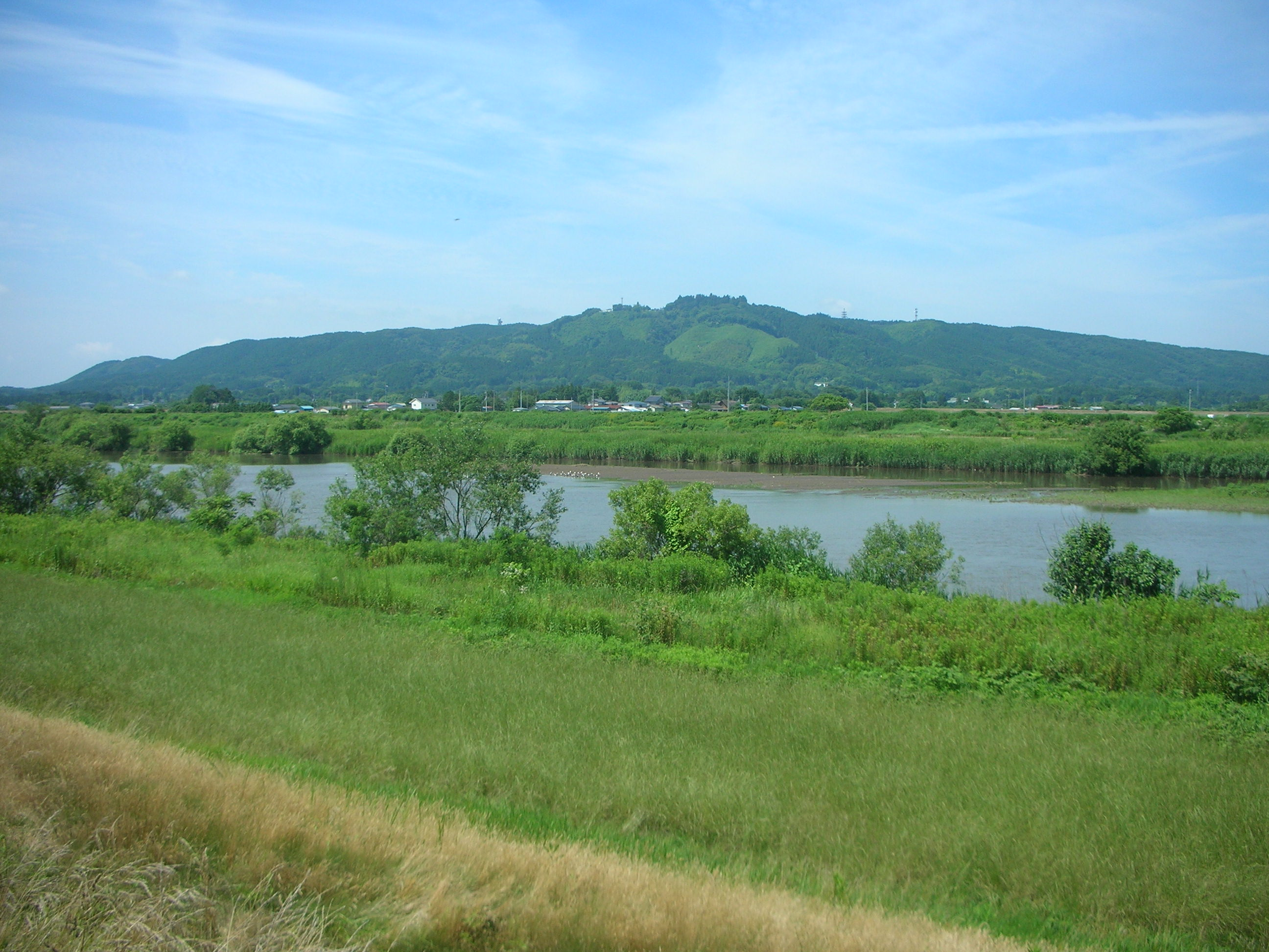 篦岳山（箟岳山）&迫川